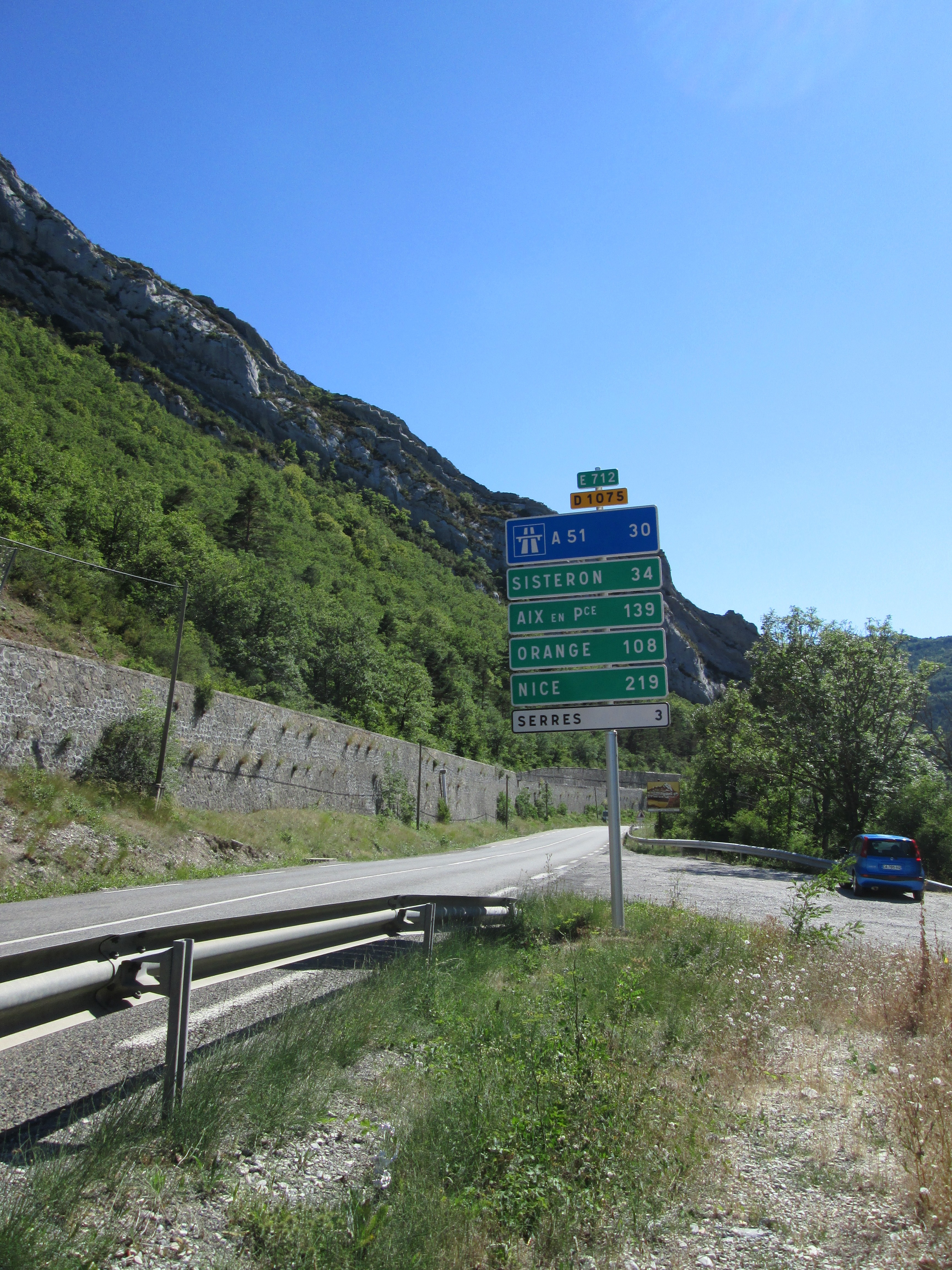 Route E712 au nord de Serres, sens nord-sud